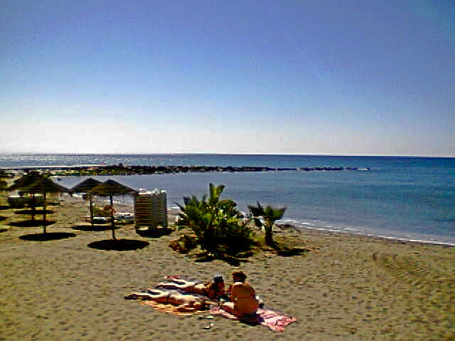 Beach in Marbella.jpg